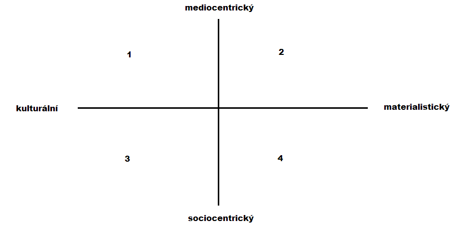 Čtyři přístupy ke studiu médií dle Denise McQuaila